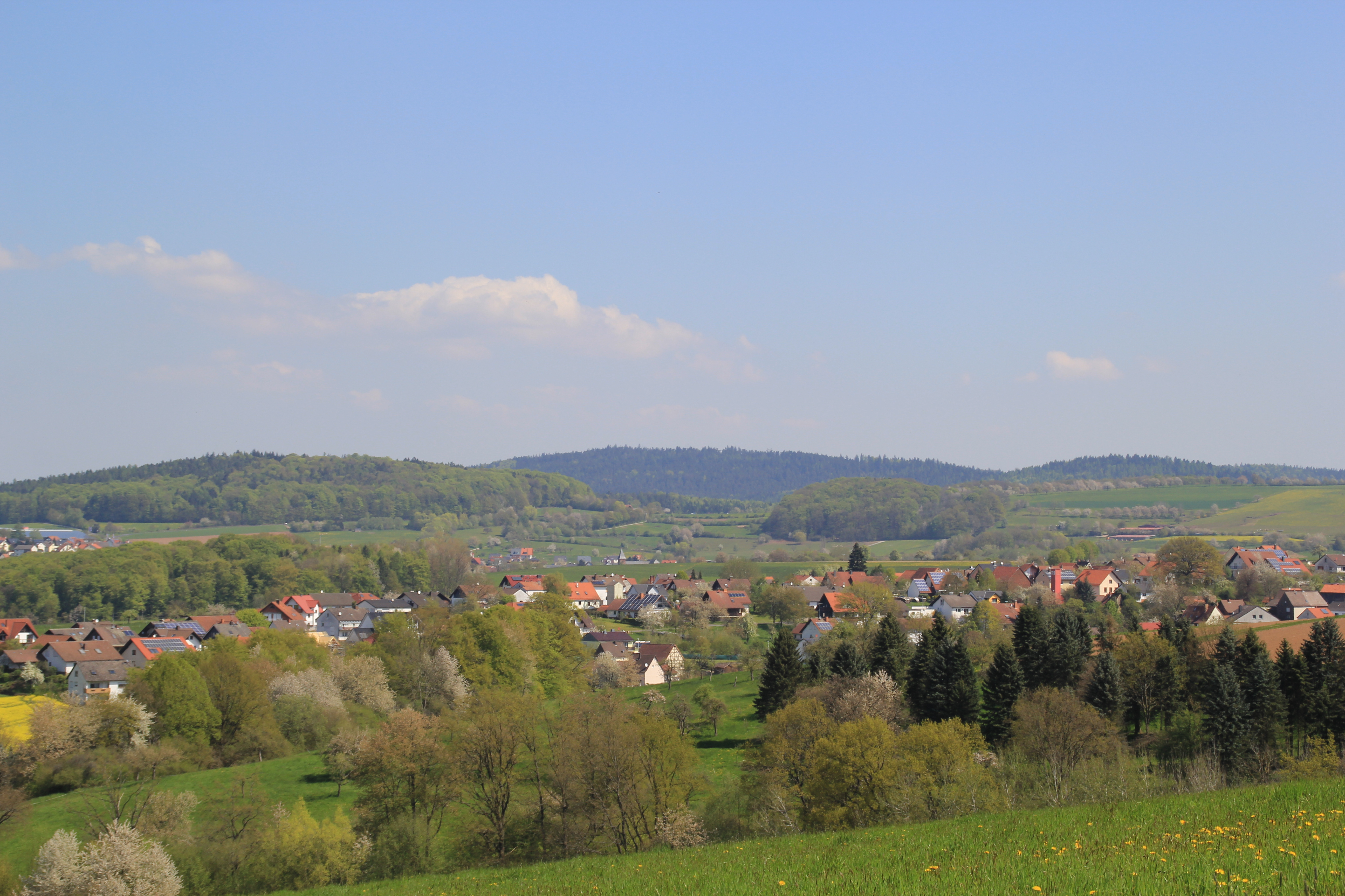 Der Franzosenkopf (im Hintergrund) im Spessart. Im Vordergrund zu sehen sind Omersbach und Geiselbach